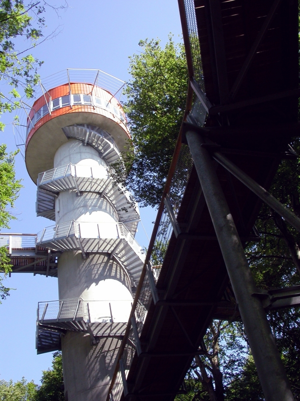 Nationalpark Hainich, Thüringen, Baumwipfelpfad, Germany